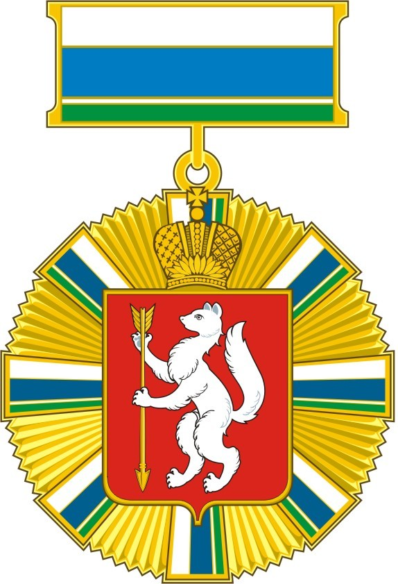 нагрудный знак к почётному званию Почётный гражданин Свердловской области